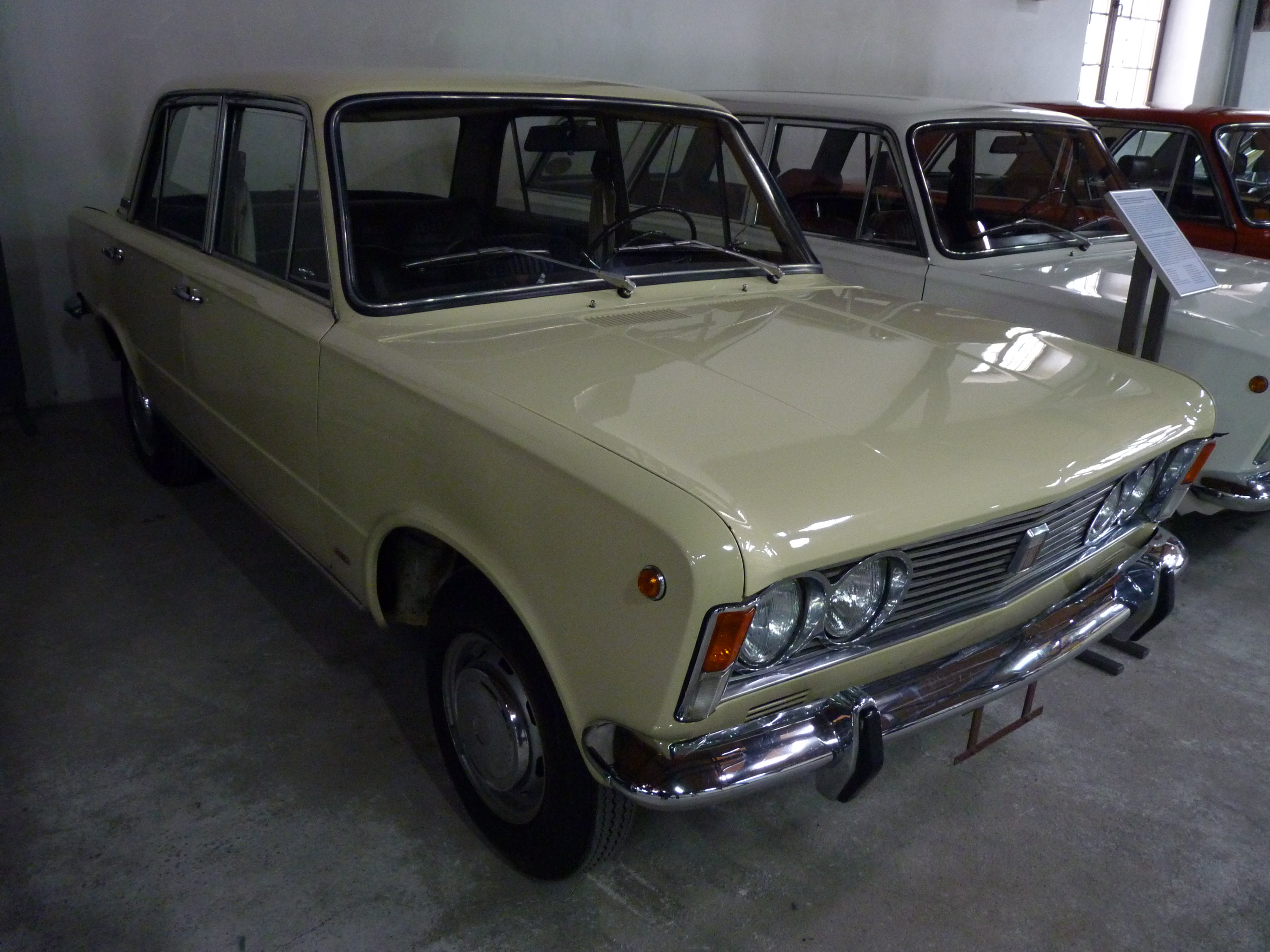 Polski Fiat 125p at the Muzeum Inżynierii Miejskiej in Kraków.JPG